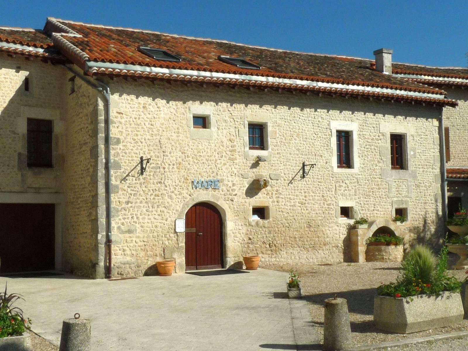 mairie de St-Amant, Charente, France